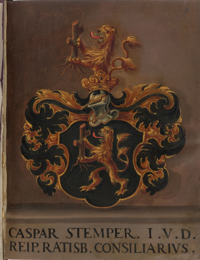 Wappen des Regensburger Ratskonsulenten Caspar Stemper (* um 1555/57; † 1608/09), verliehen am 5. August 1597. Blasonierung: In Schwarz ein rotbezungter goldener Löwe mit einem Baumstumpf (für Stemper) in den Pranken. Die Helmzier trägt eine fünfzackige Adelskrone.